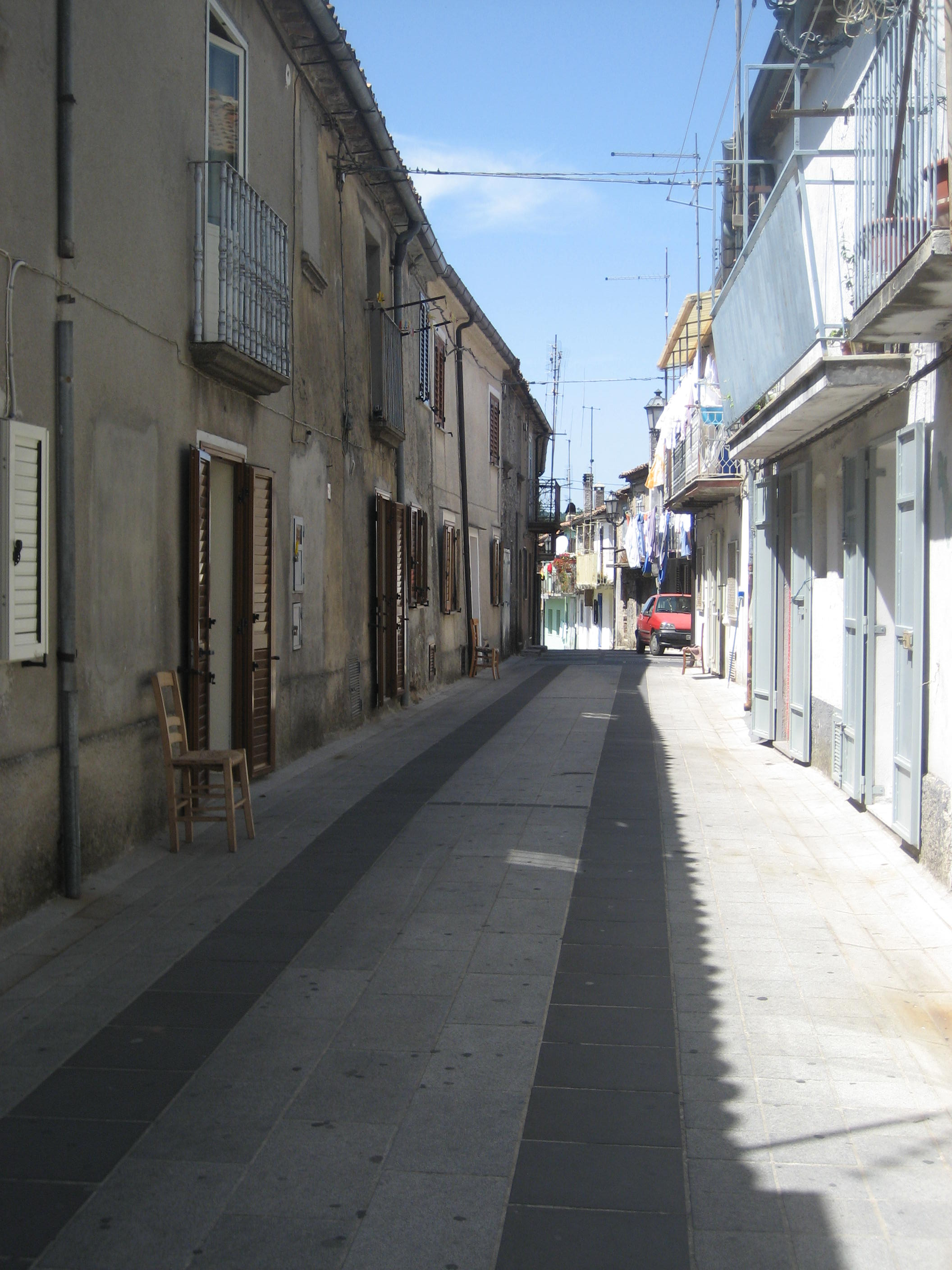 Quartiere operaio di Mongiana